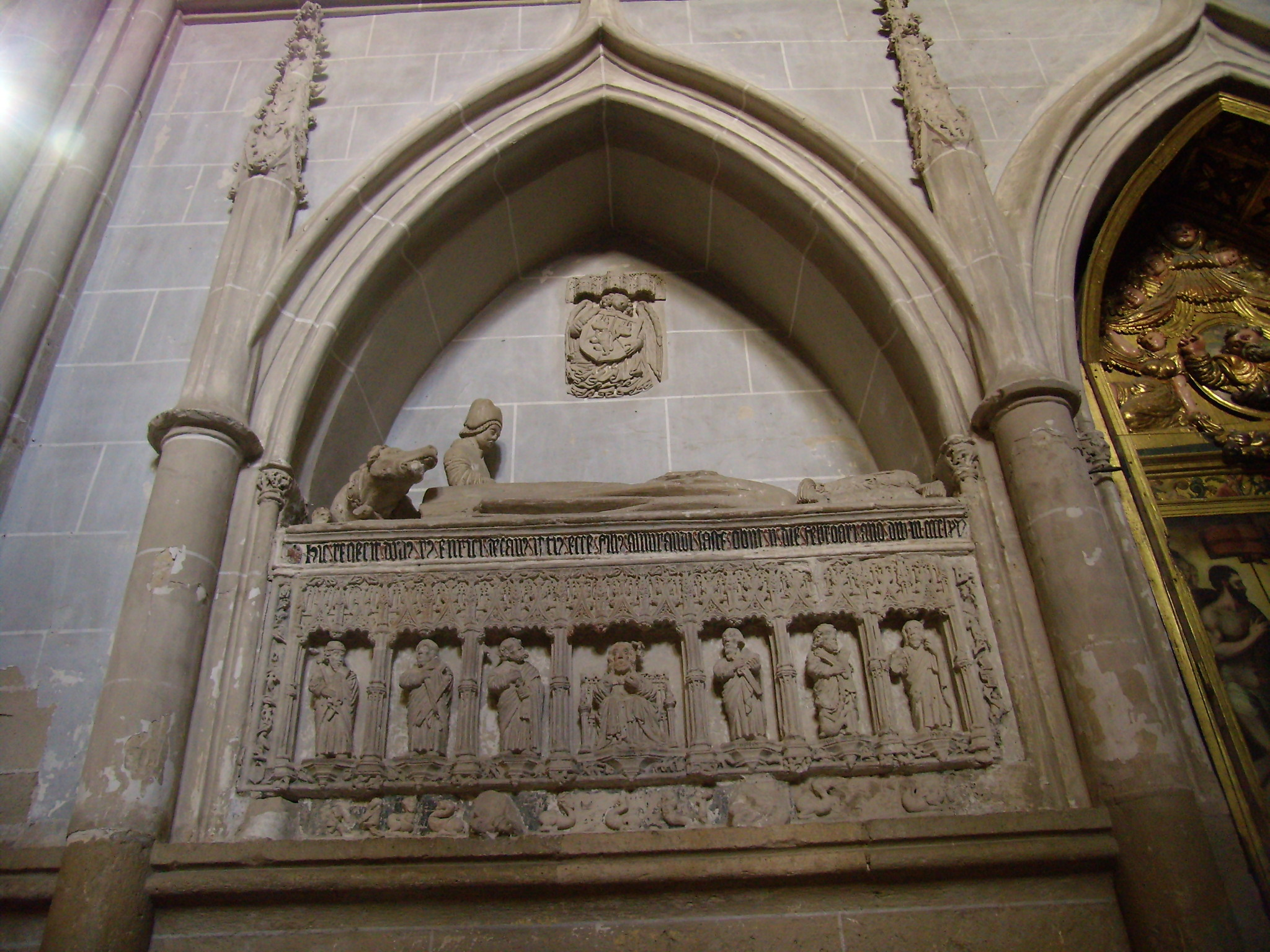 Sepulcro del arcediano Rodrigo Enríquez, fallecido en 1465 e hijo del almirante de Castilla Alonso Enríquez y bisnieto del rey Alfonso XI de Castilla. Fue realizado por el entallador Alonso de Portillo en el siglo XV y está colocado en el primer tramo del lado del Evangelio de la parte exterior de la capilla mayor de la catedral de Palencia, provincia de Palencia, (España).